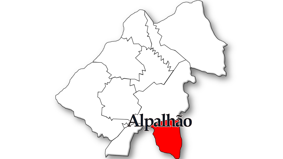 Evolução da População